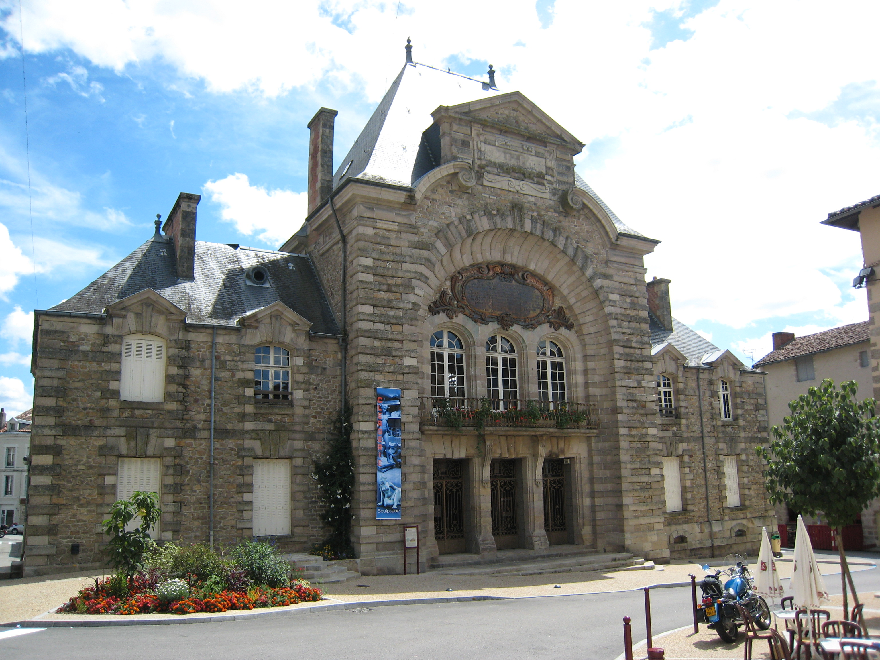 Salle des fêtes de Saint-Junien, 87, France